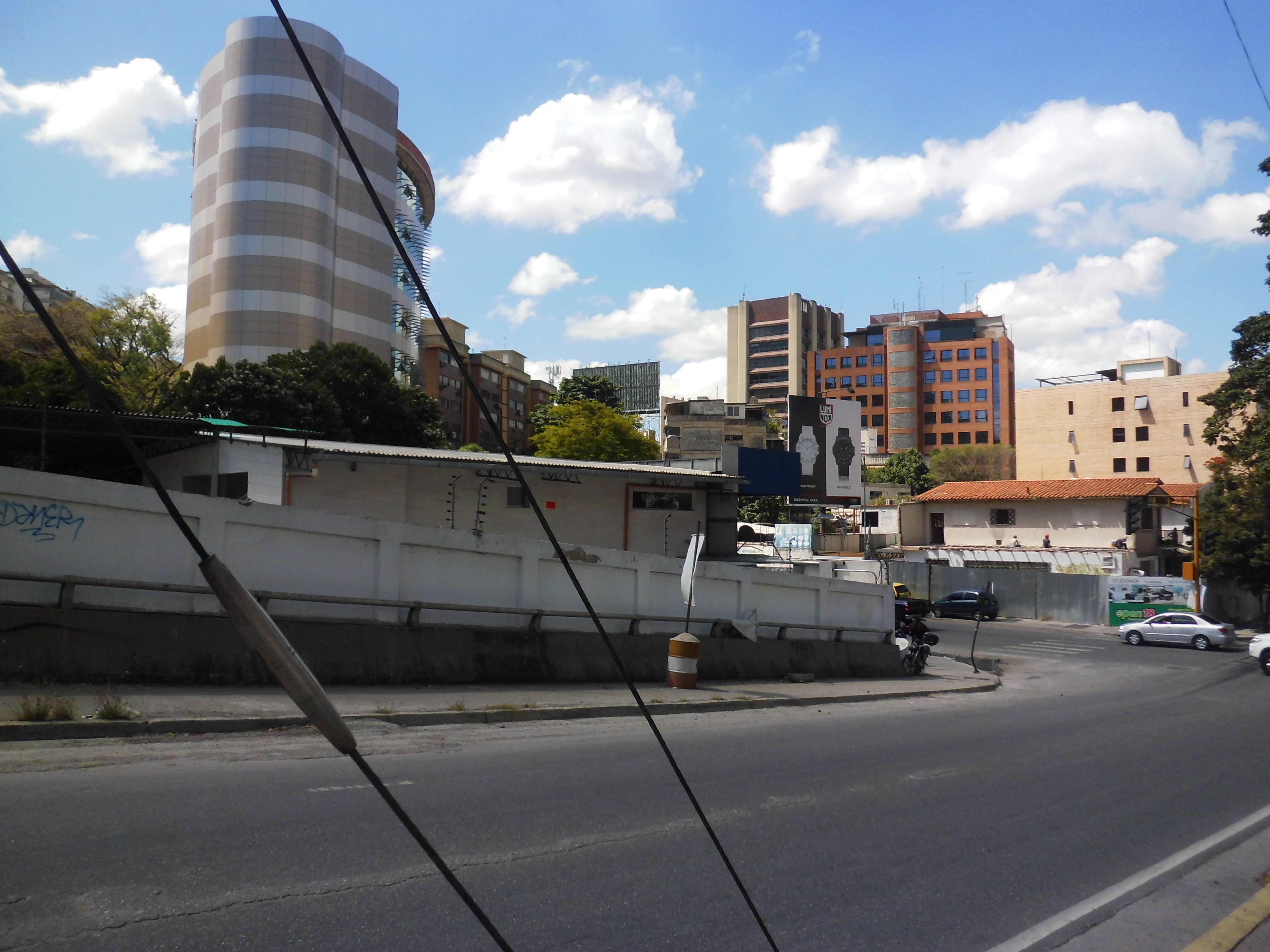 Las Mecedes - Puente Veracruz municipio Baruta, estado Miranda - Venezuela